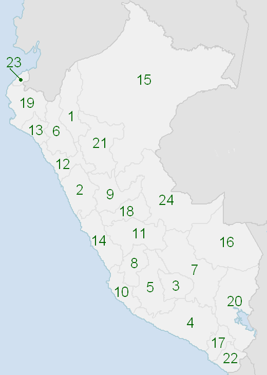 Yupasqa Piruw Suyukuna saywitu. Mapa de los departamentos del Perú numerados. Numbered map of the departaments of Peru.